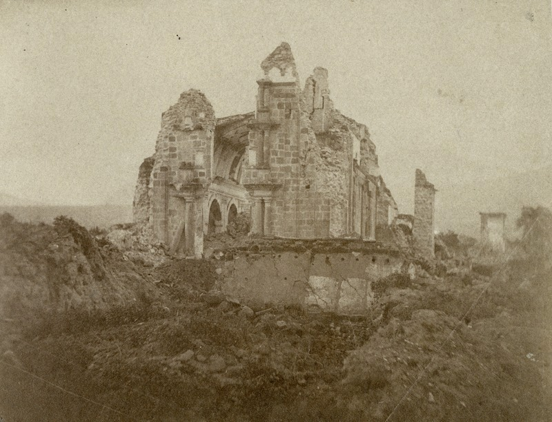 edificaciones restantes